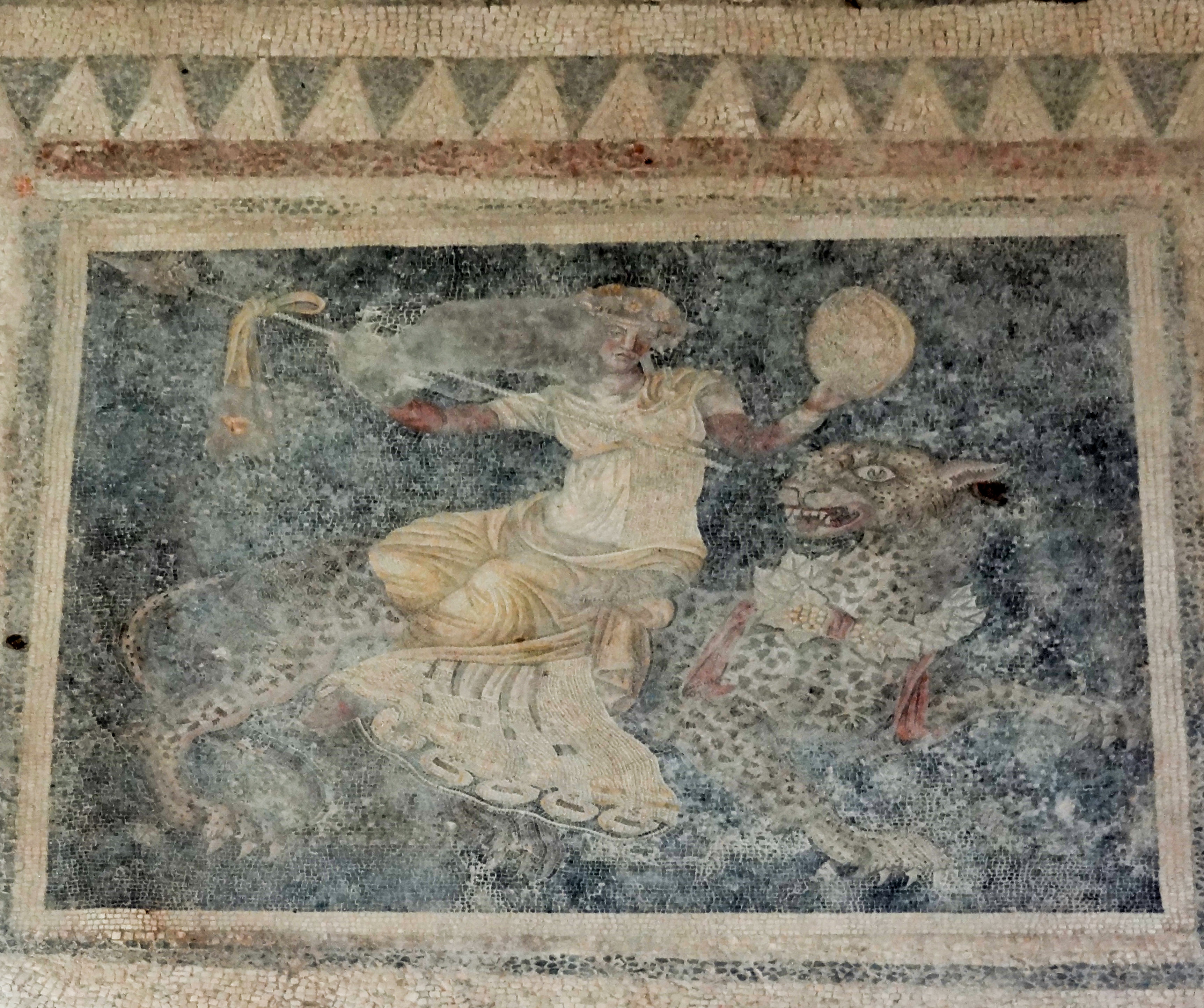 Dionysosmosaik mit dem auf einer Wildkatze reitenden Dionysos im Haus der Masken auf Delos, Kykladen, Griechenland